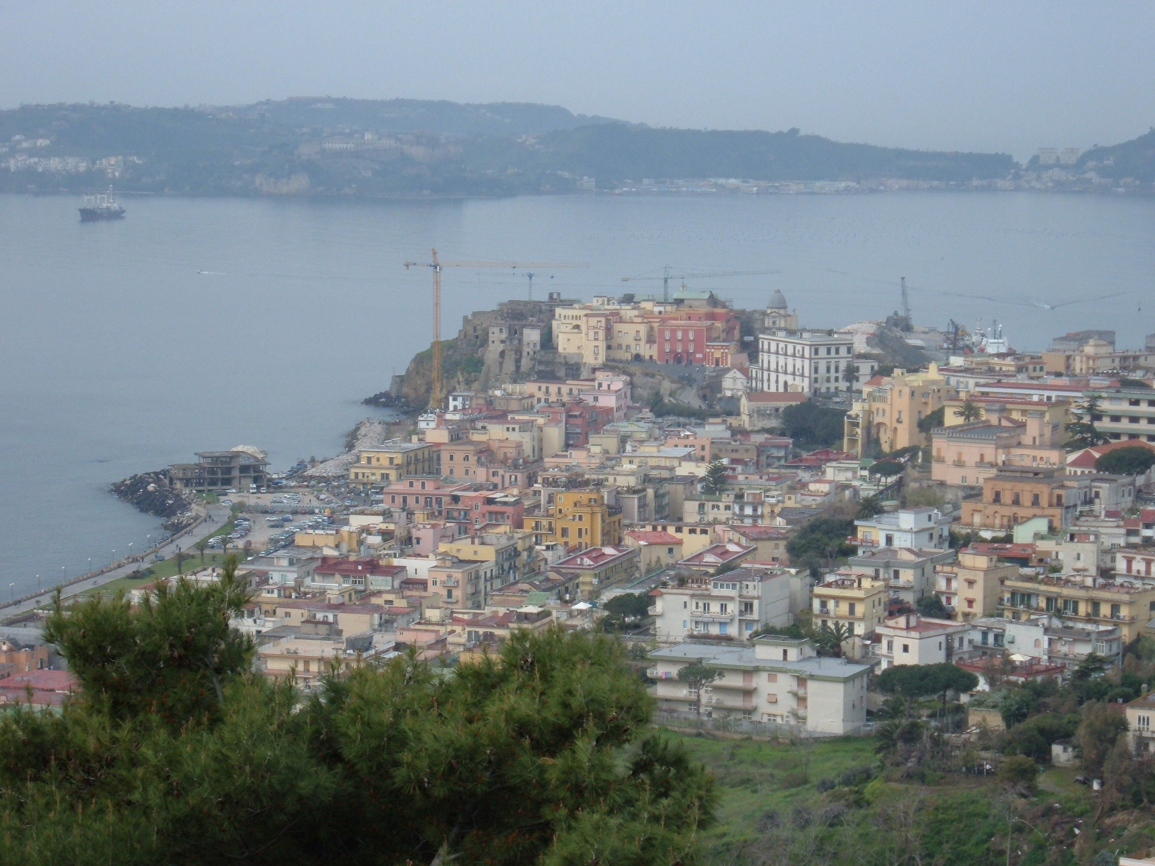 Pozzuoli, overview